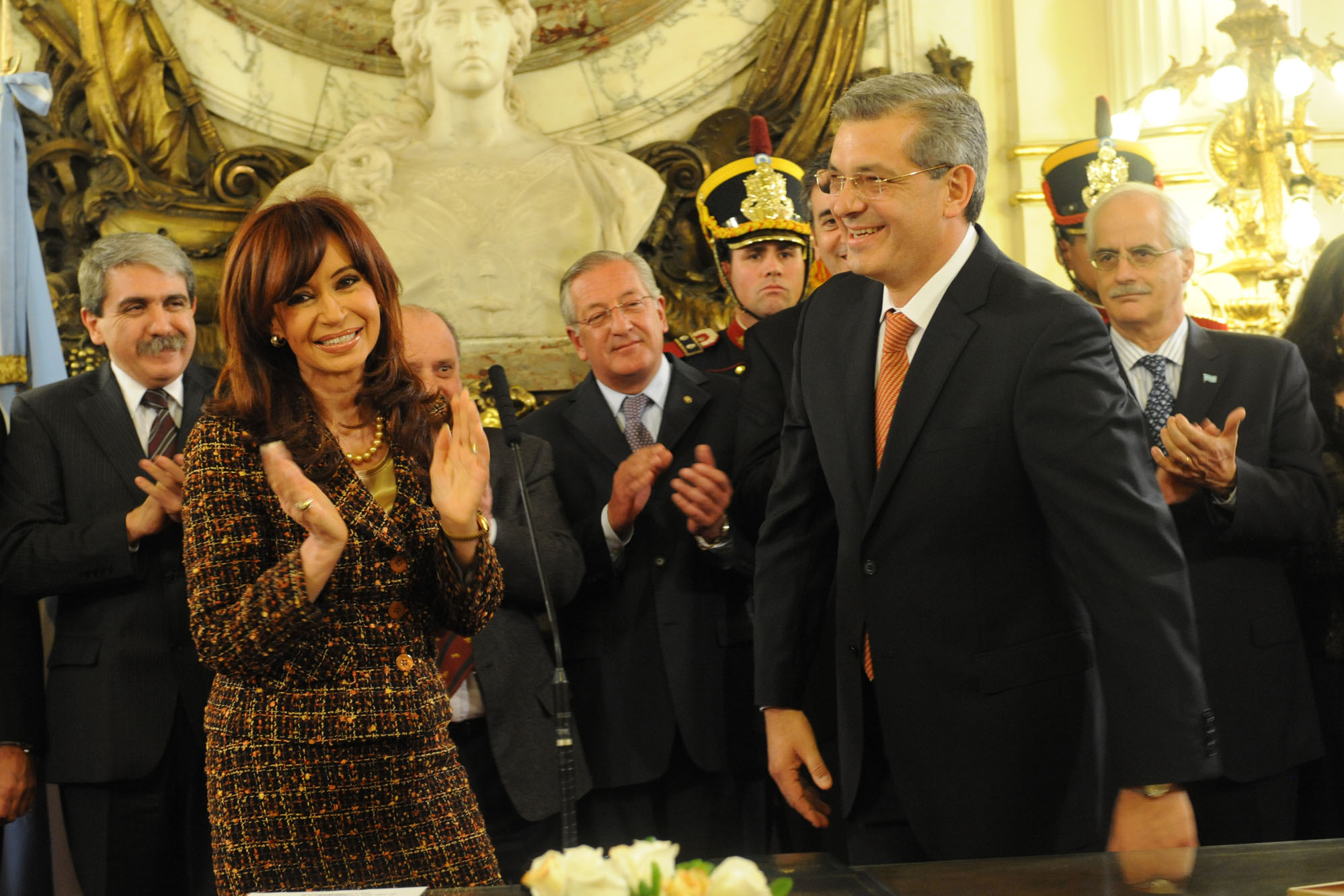 El nuevo ministro de Agricultura, Ganadería y Pesca jura ante la Presidenta en el Salón Blanco de Casa de Gobierno